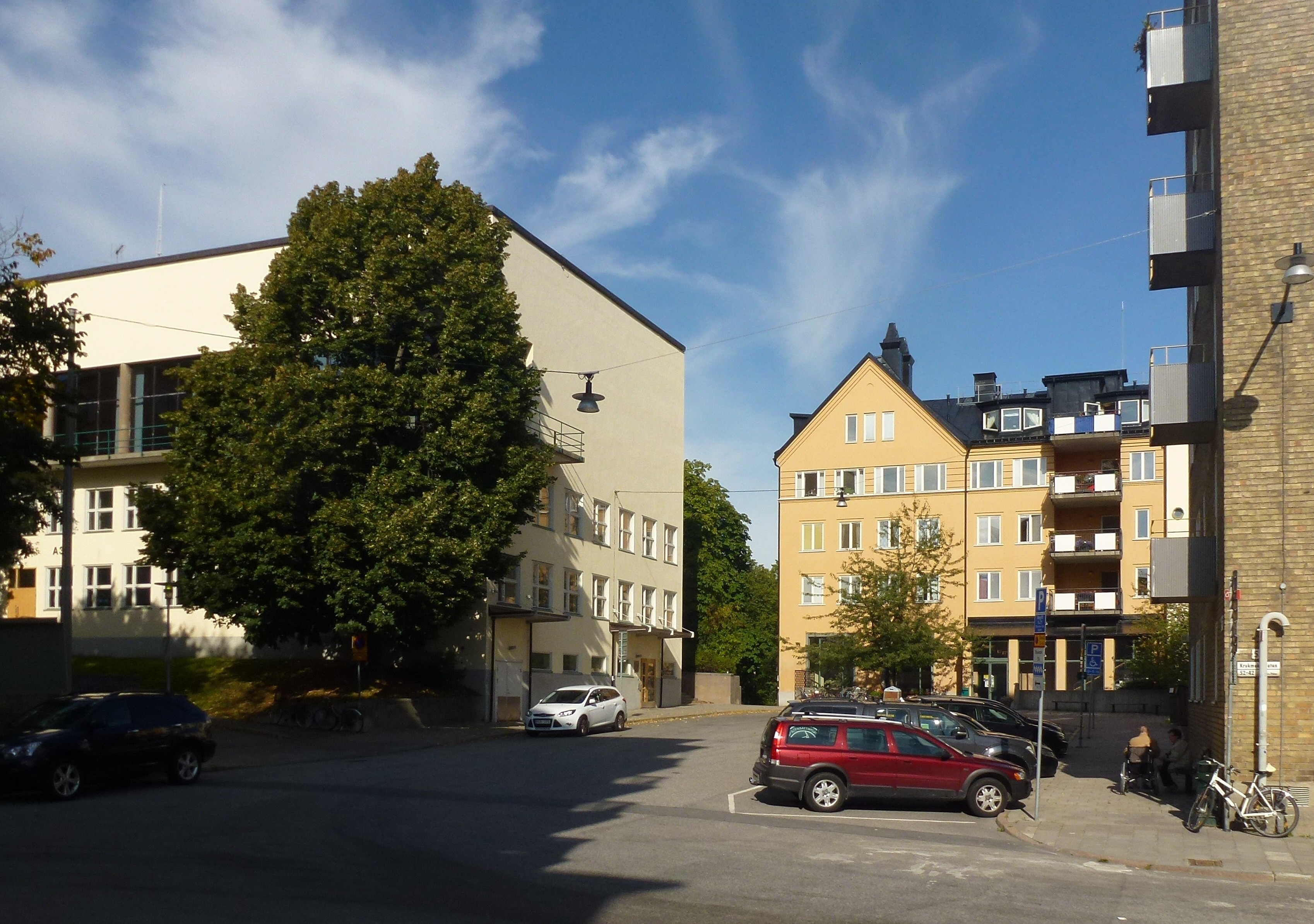 Hornskroken mot norr, till vänster syns "Globala gymnasiet"